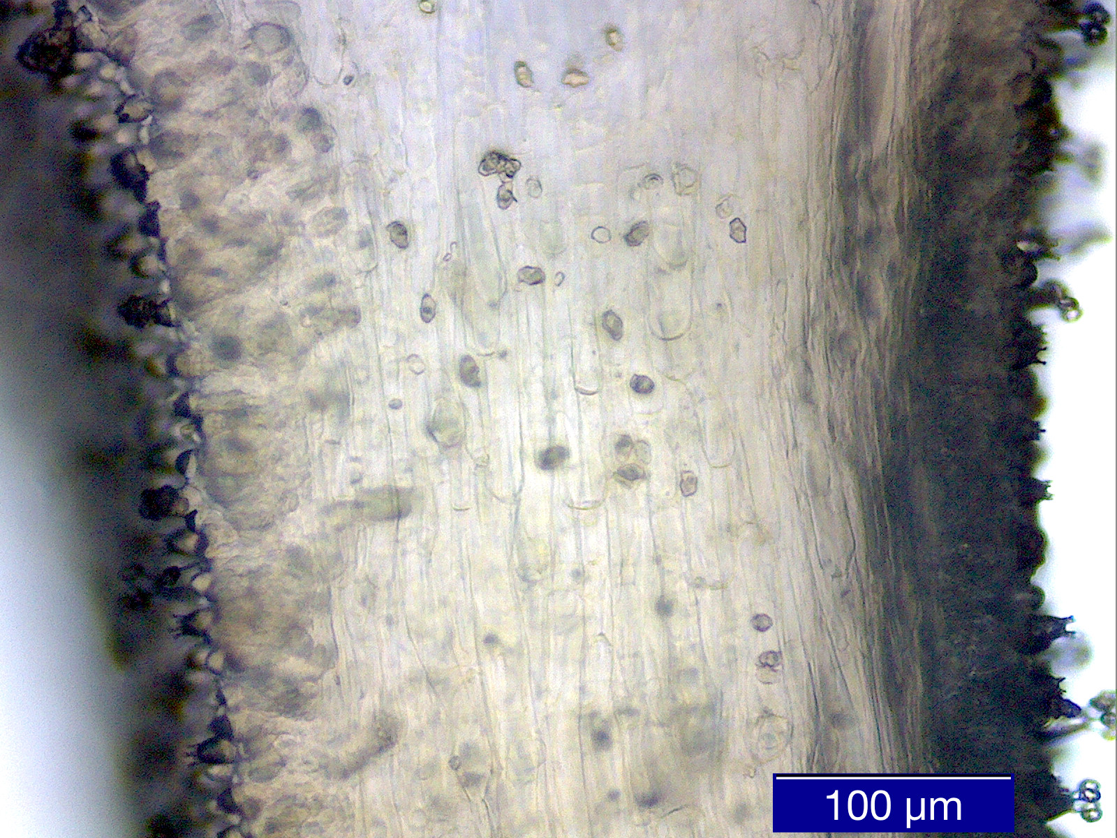 Entoloma (Fr.) P. Kumm.